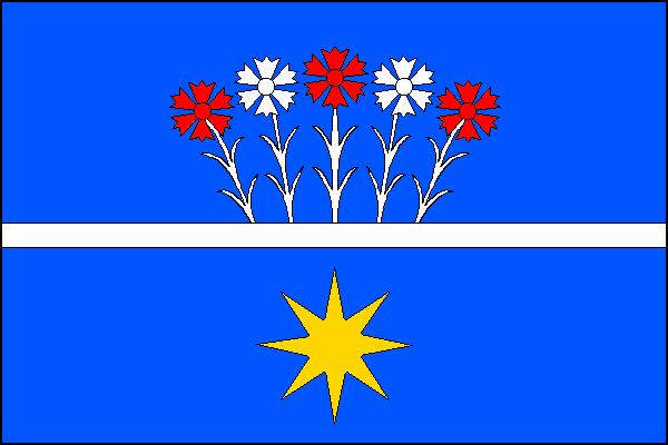 Vlajka obce Toušice